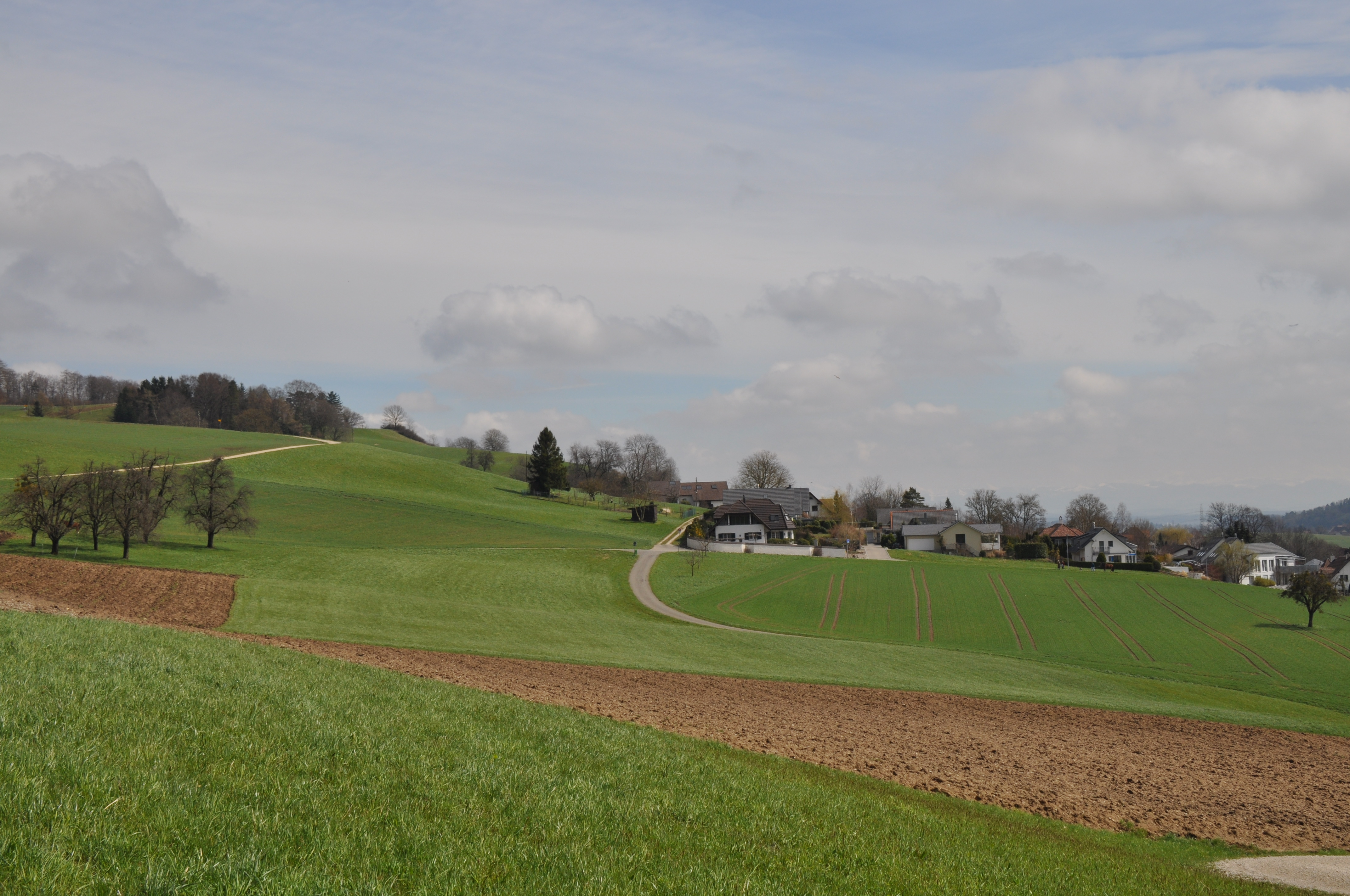 Römischer Gutshof Heinimürler: ungefähre Lage des Gutshofes (siehe Notizen)